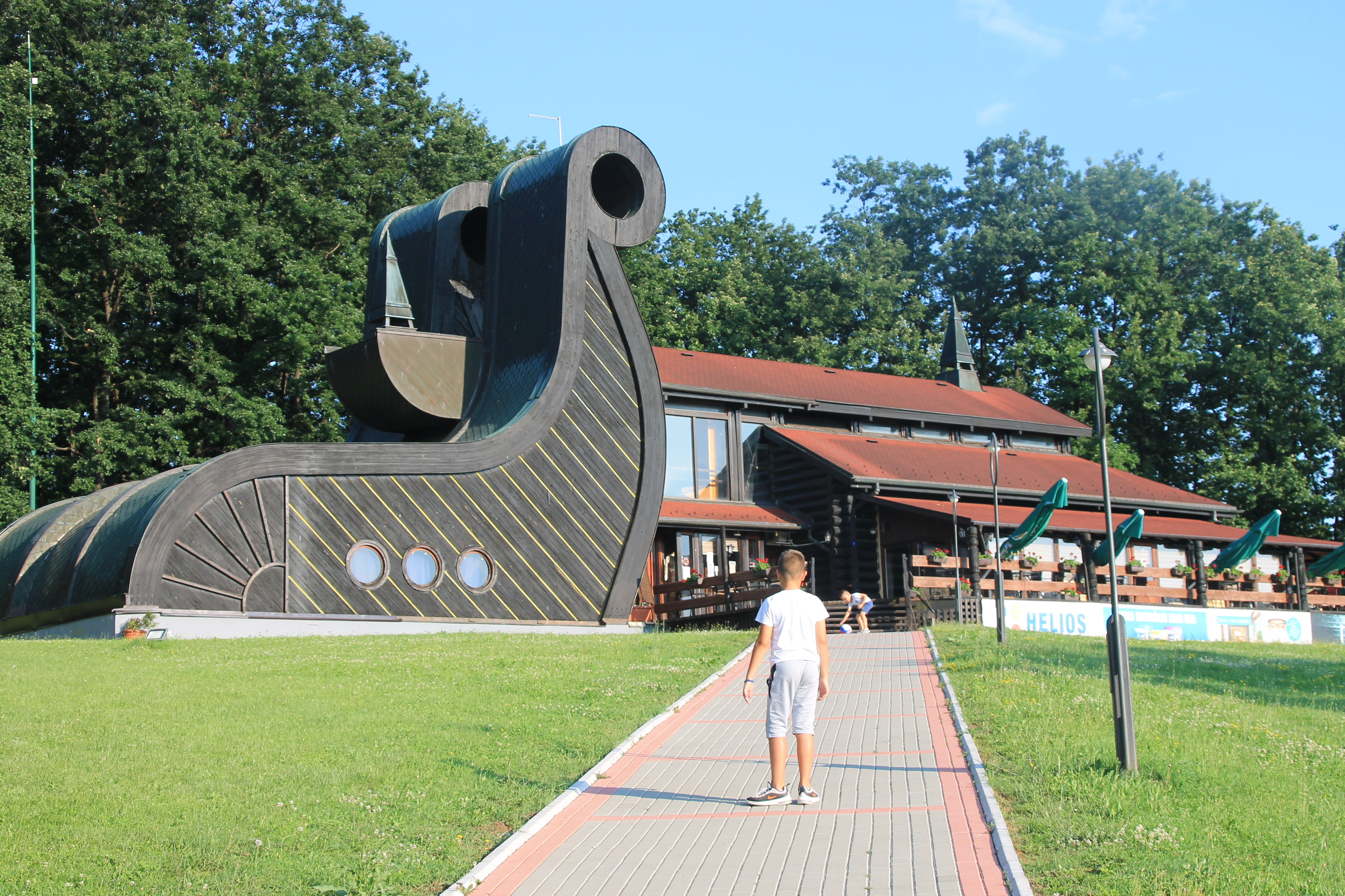 Kuća srpsko-norveškog prijateljstva